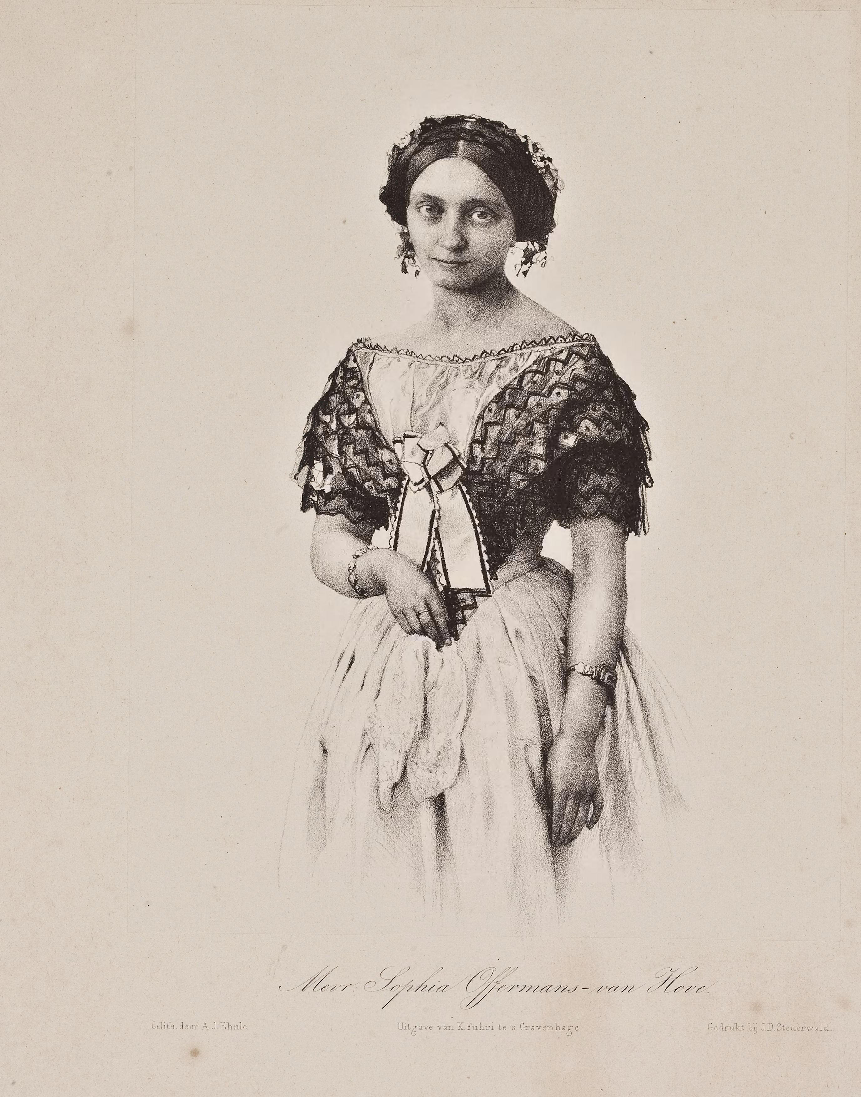 Sophia Johanna Huberta Offermans-Ten Hove (1829-1906), concertzangeres, hofzangeres van Willem III. Litho door Adrianus Johannes Ehnle. Uitgegeven door K. Fuhri, 's Gravenhage; gedrukt bij J.D. Steuerwald. Afmeting: 23 x 17,6 cm op blad 35 x 26,6 cm. Collectie Gelders Archief.